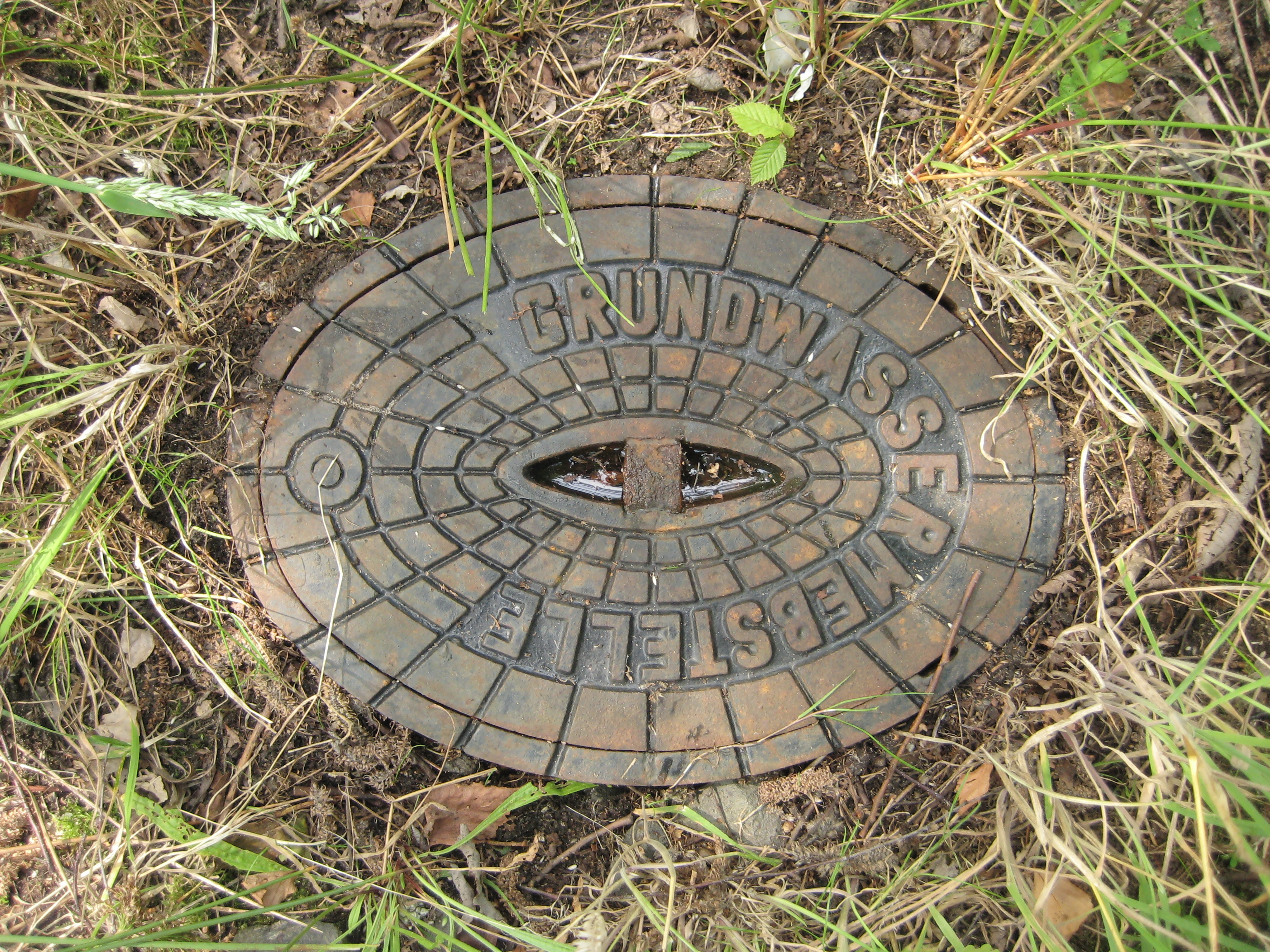 Zwischen den beiden Gleisen des ehemaligen Bahnhofs Edendorf (stillgelegt 1975), eine Grundwassermessstelle. Alter?